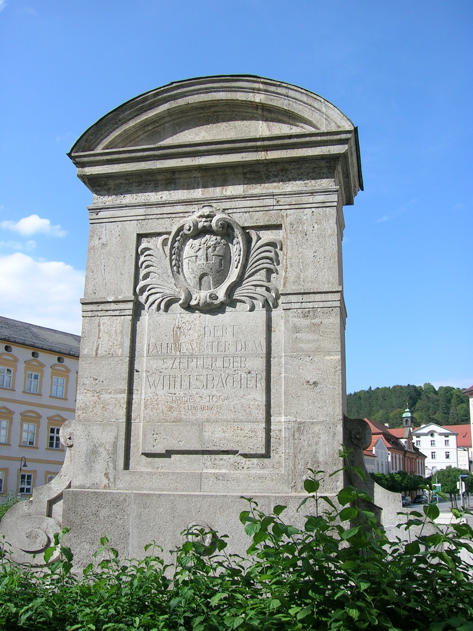 Südseite des Wittelsbacher Brunnen am Leonrodplatz Eichstätt